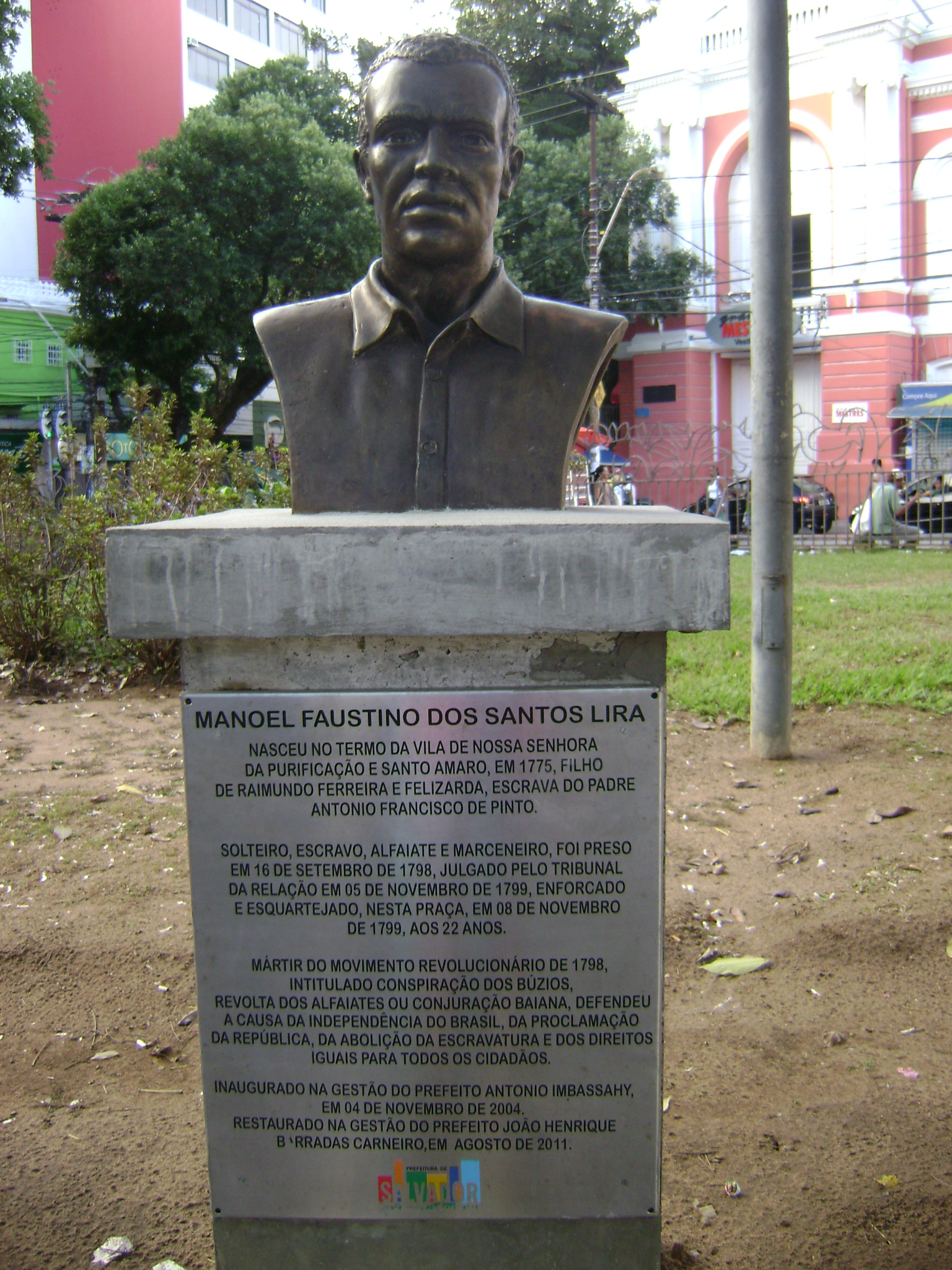 Estátua de Manoel Faustino no Largo da Piedade, em Salvador, Bahia, Brasil.